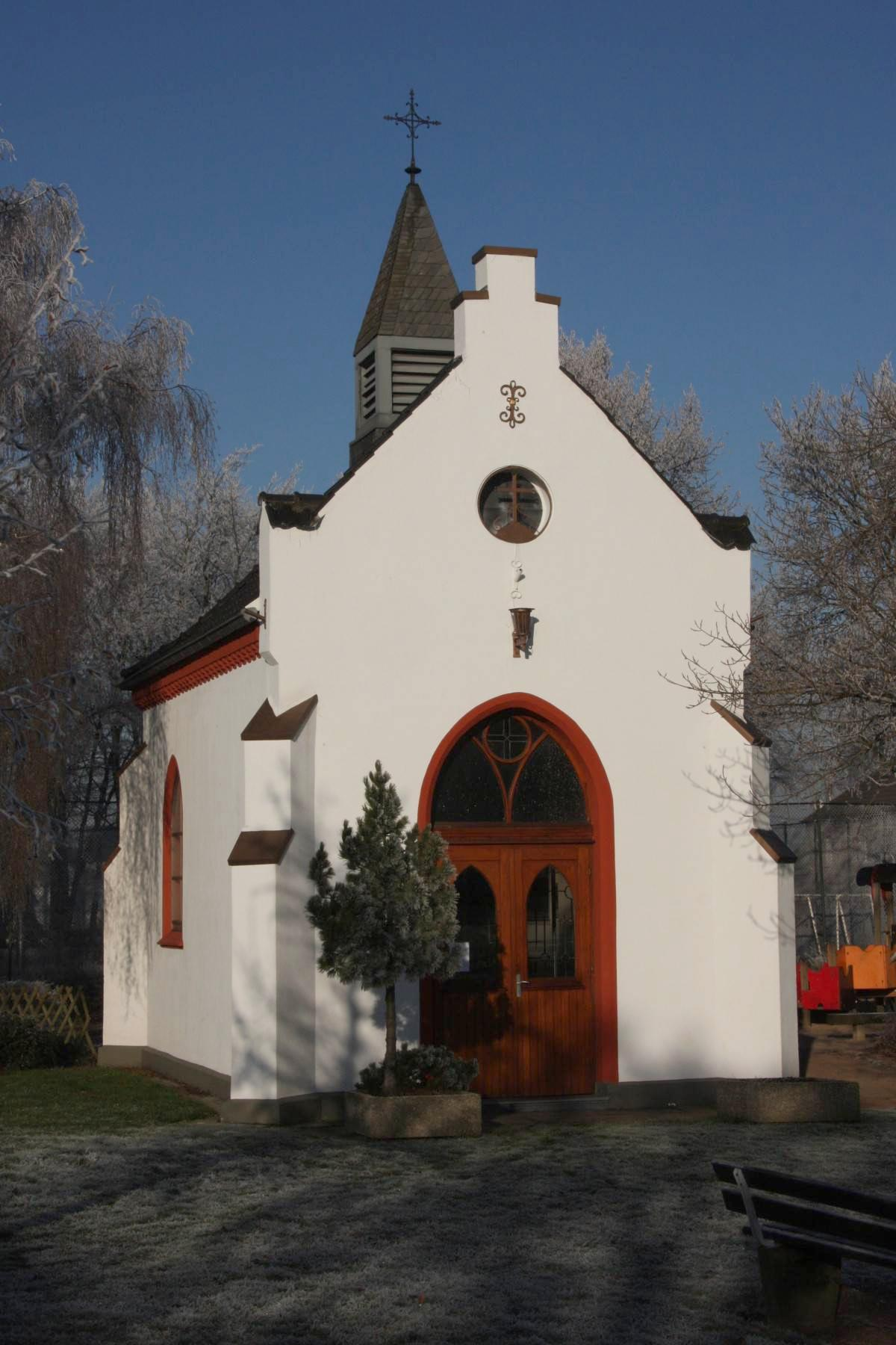 Kapelle des hl. Antonius von Padua in Pley